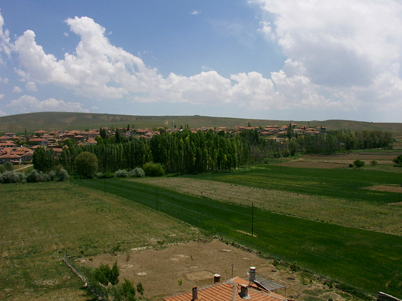 Köşektaş köyü Hacıbektaş, Nevşehir